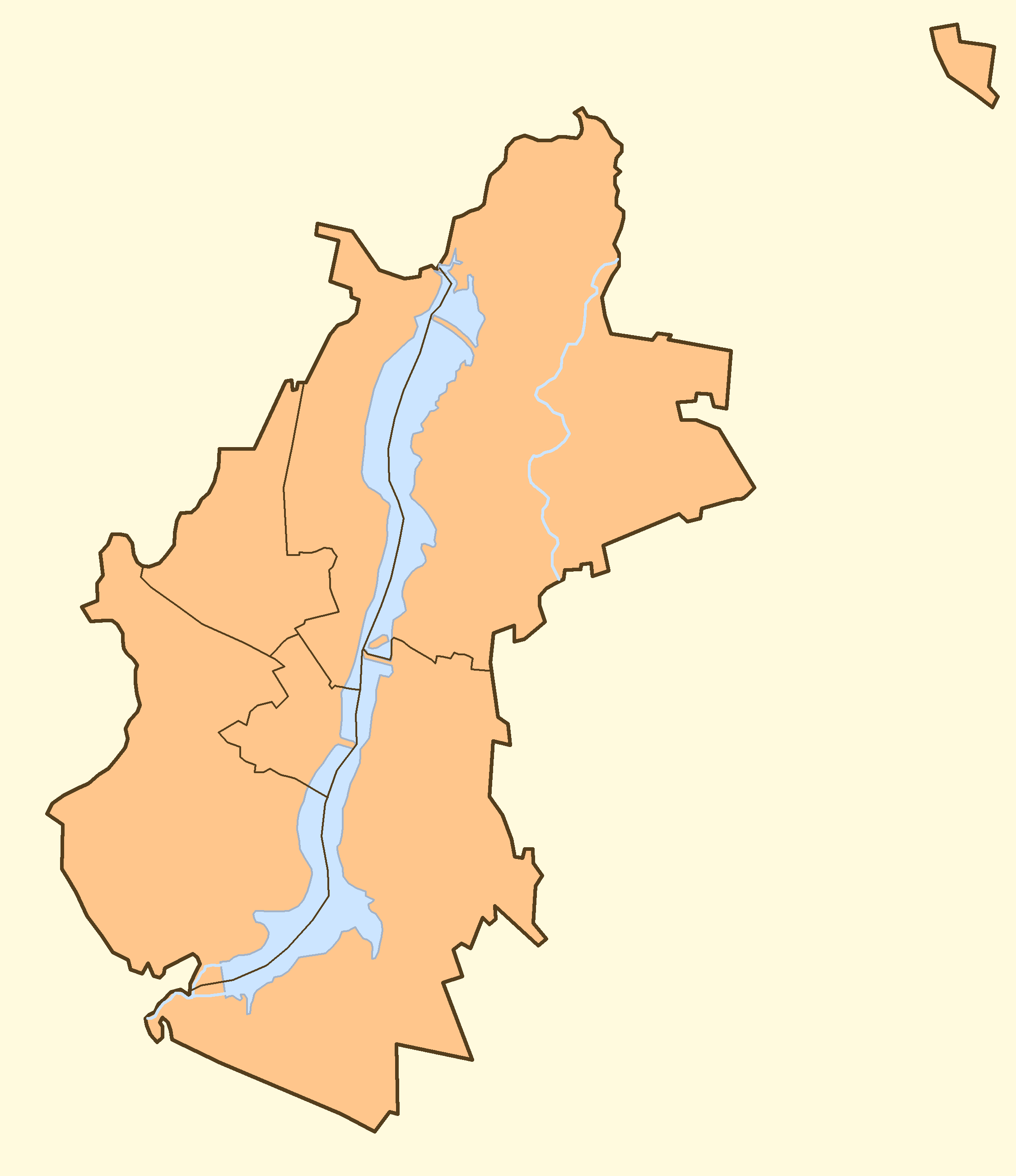 Позиционная карта Воронежа